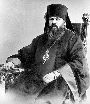 Антонин (Грановский), еп. Владикавказский. Фотография. 1914 -1915 гг. (РГИА)